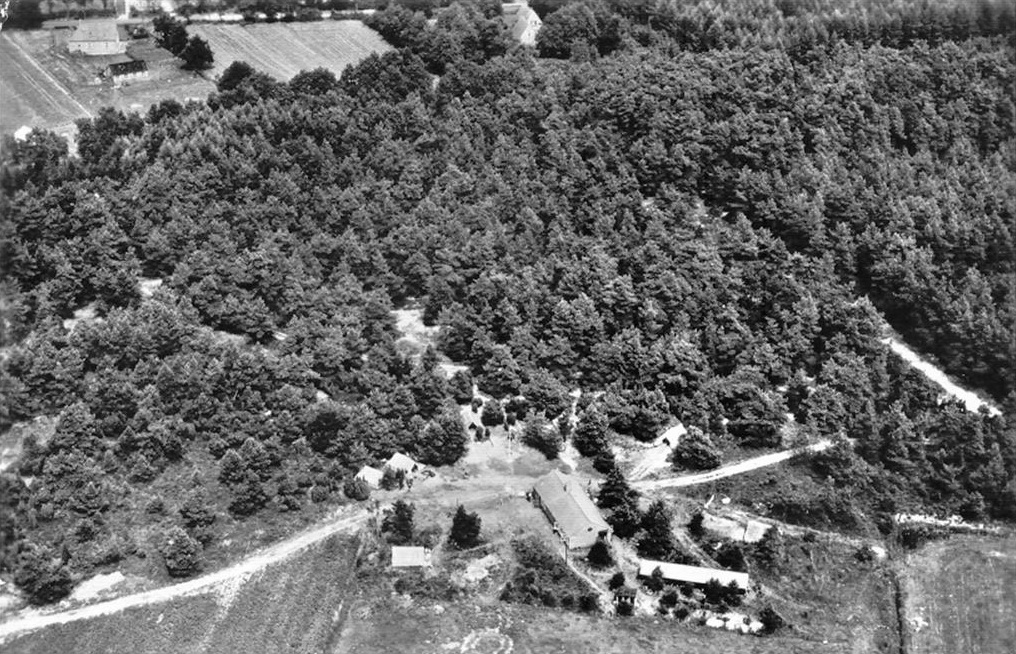 Tentenkamp Kamp de Marke omstreeks 1960